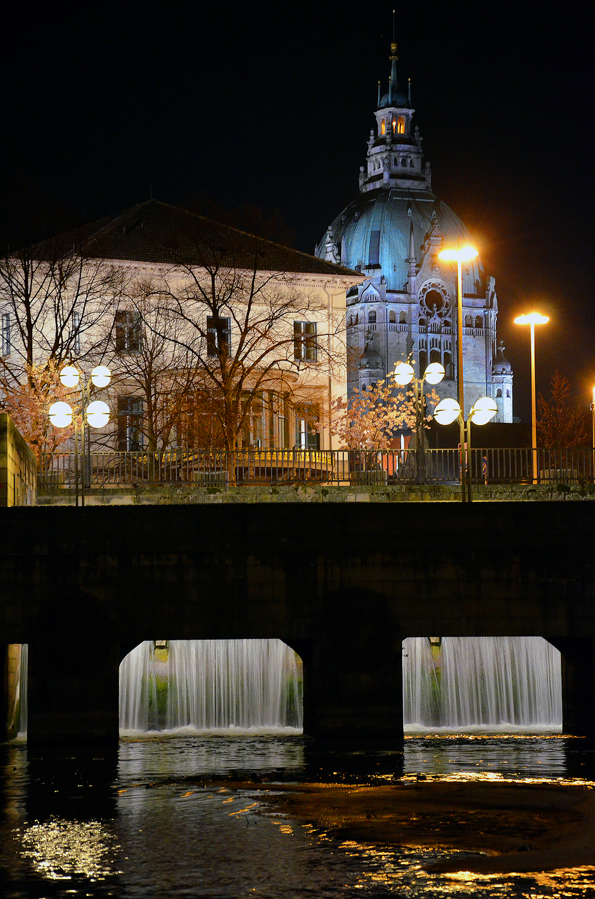 An Stelle der ehemaligen Flusswasserkunst in Hannover führt heute (Stand: 03/2014) eine namenlose Fußgängerbrücke über die Leine. Die Brücke wird insbesondere am Wochenende von mit der Bahn reisenden Fußballfans von Hannover 96 genutzt, die mittels der angrenzenden Unterführung den vielbefahrenen Friederikenplatz passieren. Das Foto gewährt vor der Belaubung der Bäume im Frühling eine illuminierte "Nachtaufnahme" von der Uferbefestigung unterhalb des Leineschlosses mit Blick auf das Wangenheimpalais und das Neue Rathaus. Vor dem Abriss der - funktionsfähigen - Flusswasserkunst Anfang der 1960er Jahre trug der Platz vor dem Palais den Namen "Himmelreich": An Stelle der Sandbank im Vordergrund soll im Zuge der innerstädtischen Umbaupläne Hannover City 2020 + der von Wasserrauschen erfüllte Ort für eine größere Öffentlichkeit erlebbar werden ...